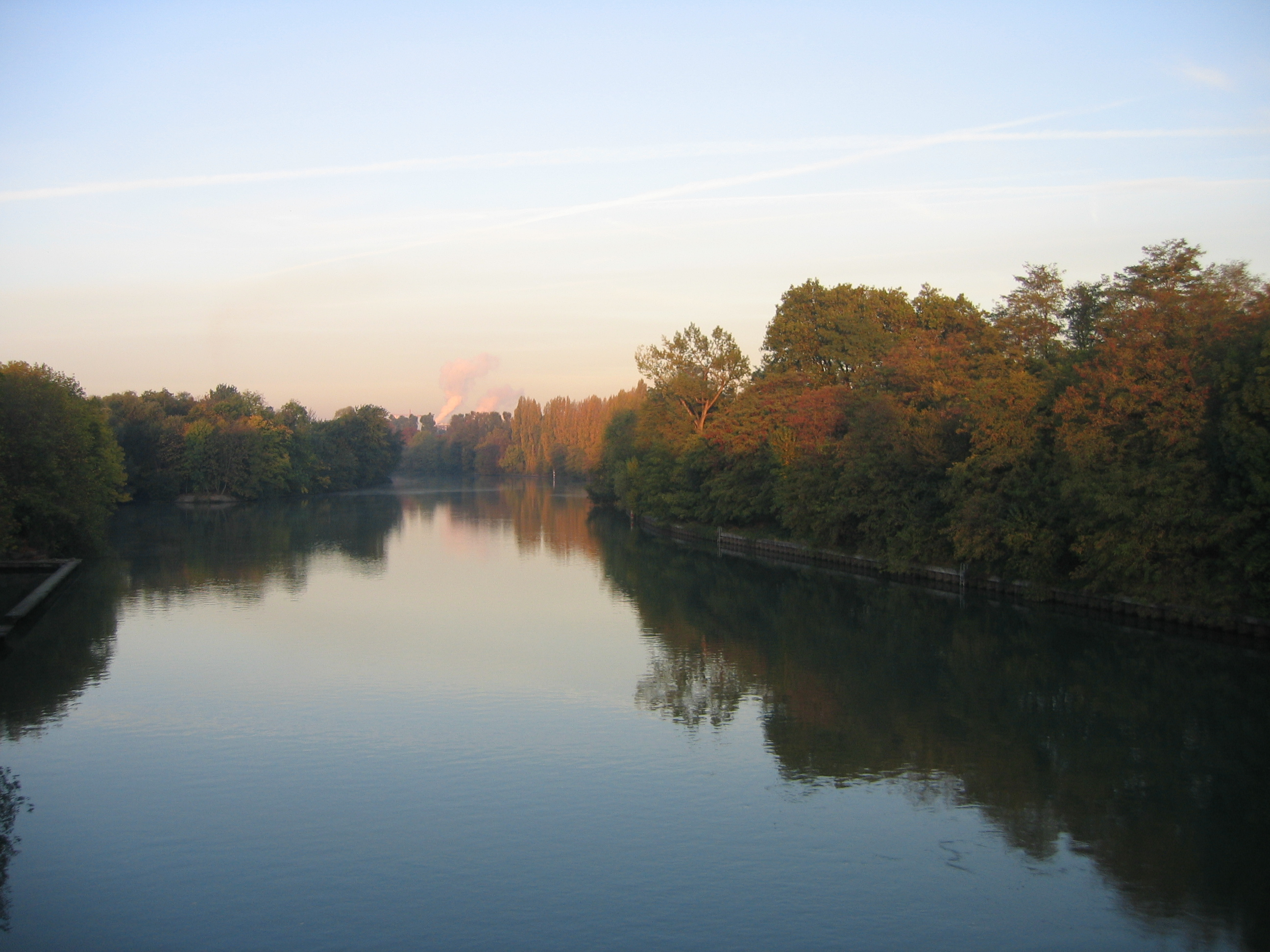 Vue sur la Marne au petit matin, prise d'une passerelle, Maisons-Alfort, France